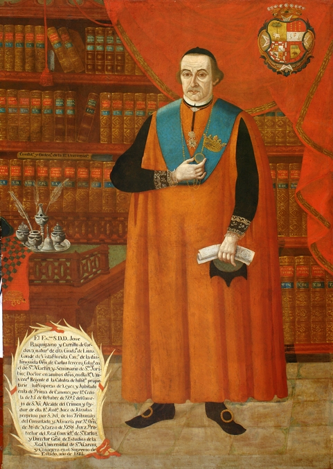 Retrato del político hispano-peruano José Baquíjano y Carrillo de Córdoba (1751-1817), que fue el III conde de Vistaflorida, consejero de Estado del Consejo de Regencia de España e Indias. Murió en Sevilla en 1817.